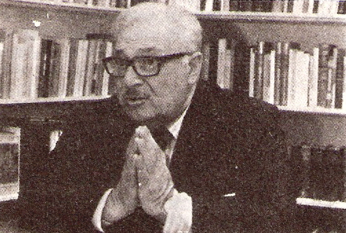 Rogelio Frigerio, político argentino